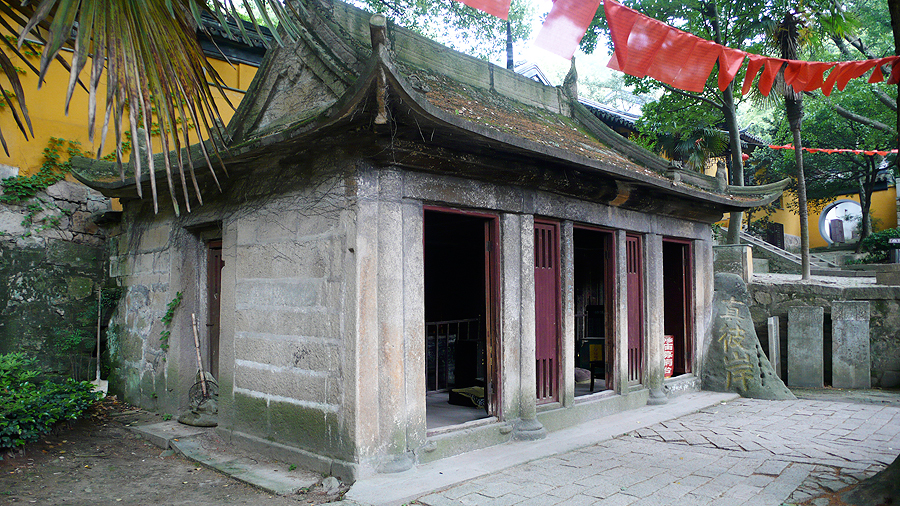 更多haier7917的中国古建照片：